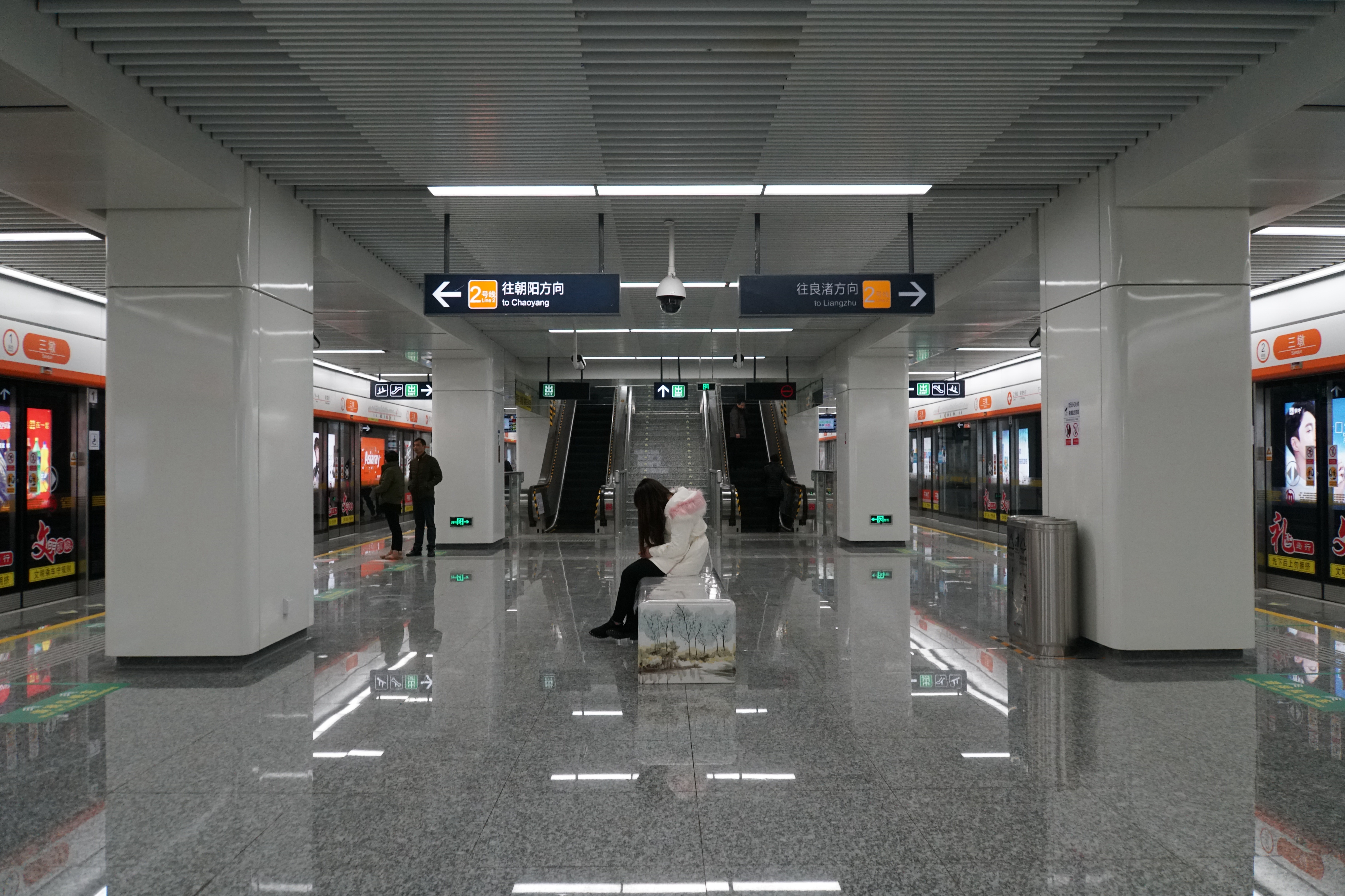 三墩站站台